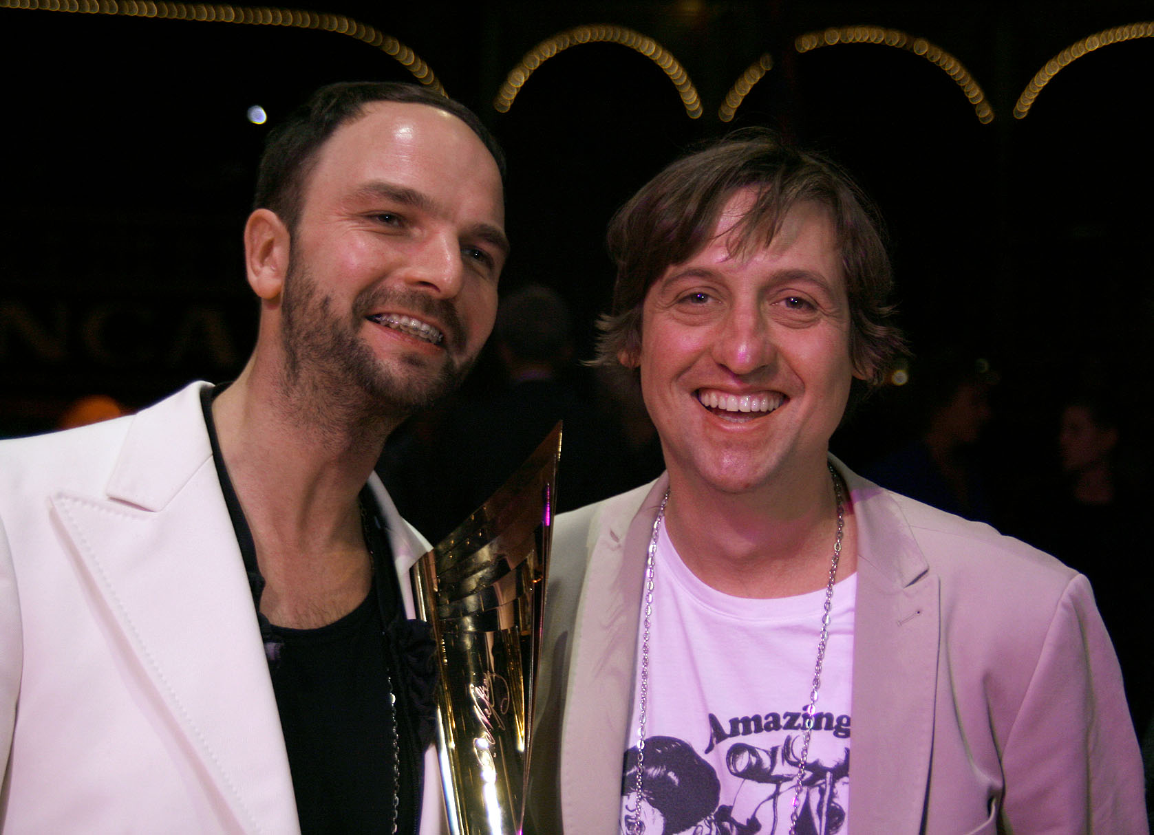 Thomas Frank und Haiko Pfostwährend der Verleihung des Nestroy-Theaterpreises 2009 (Circus Roncalli auf dem Wiener Rathausplatz).